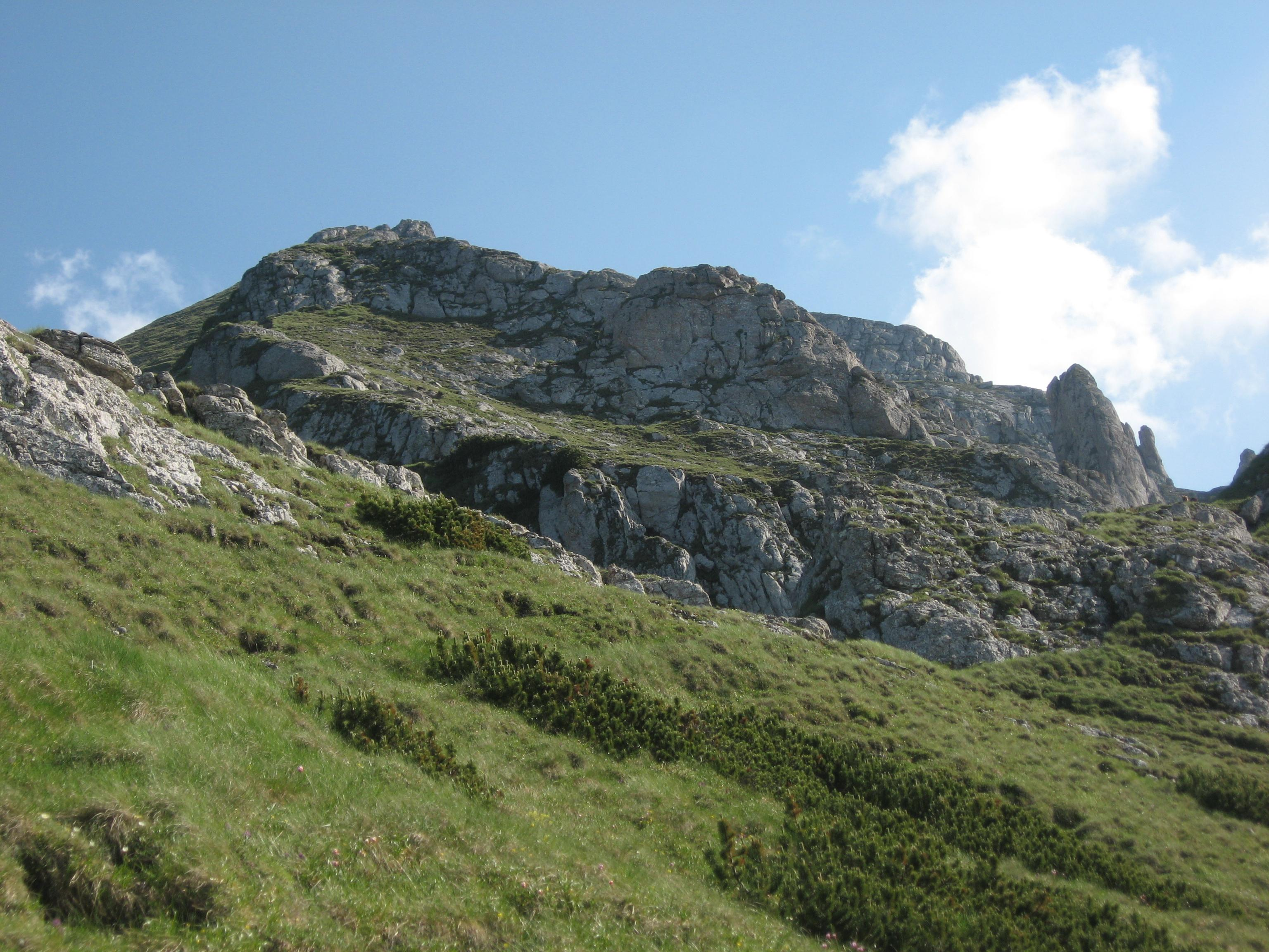 Vedere din creasta Bucsoiu.